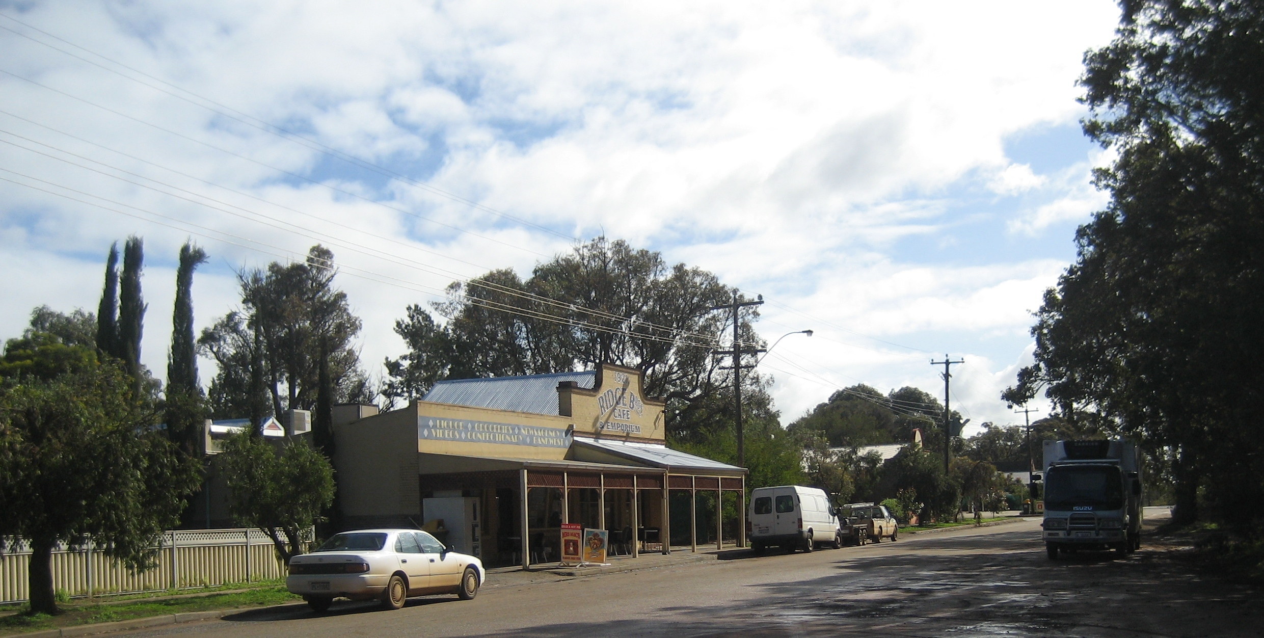 Kendenup, Western Australia